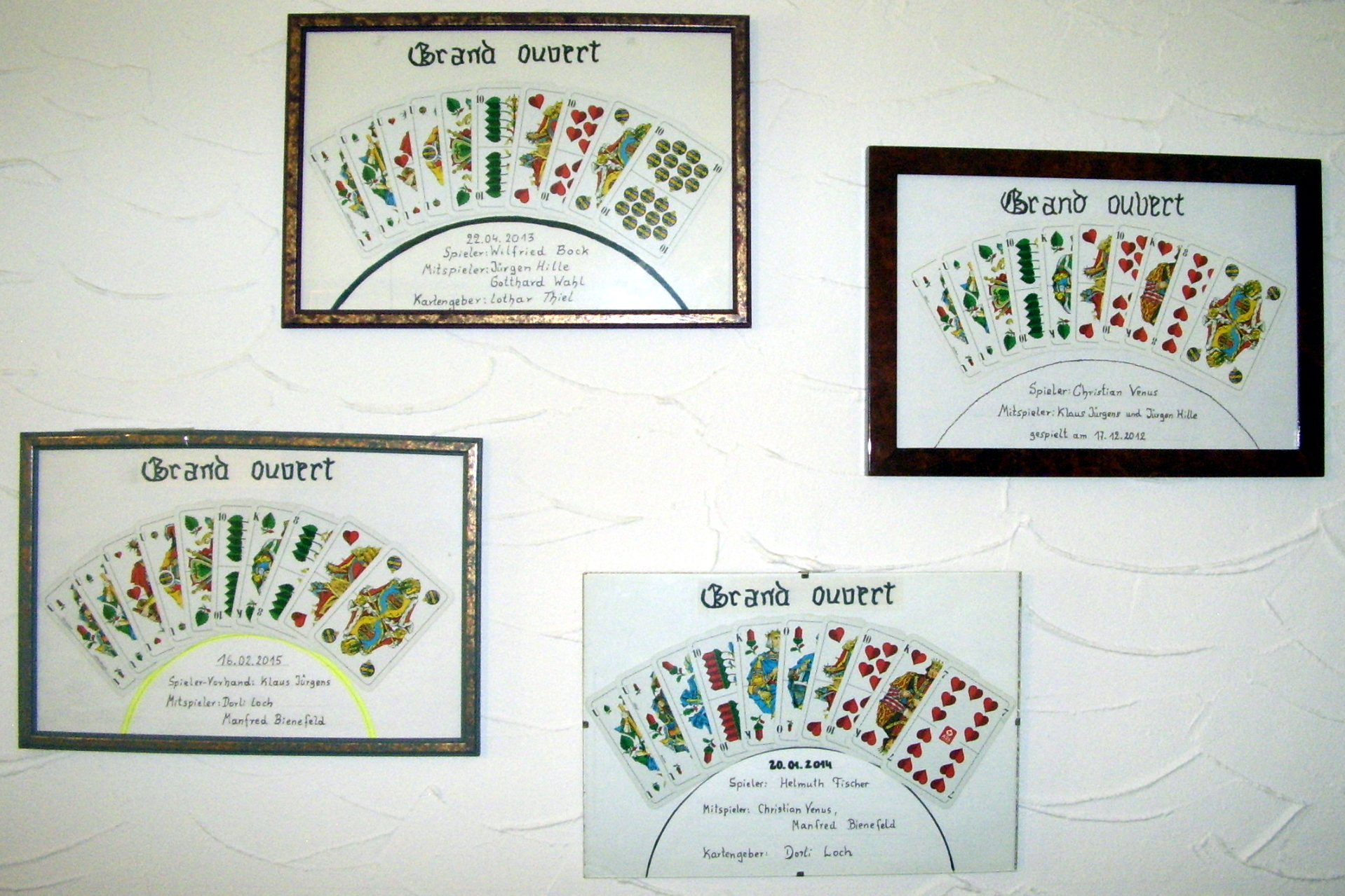 Dresden Gruna Pfefferminze Skatclub Grand ouverts